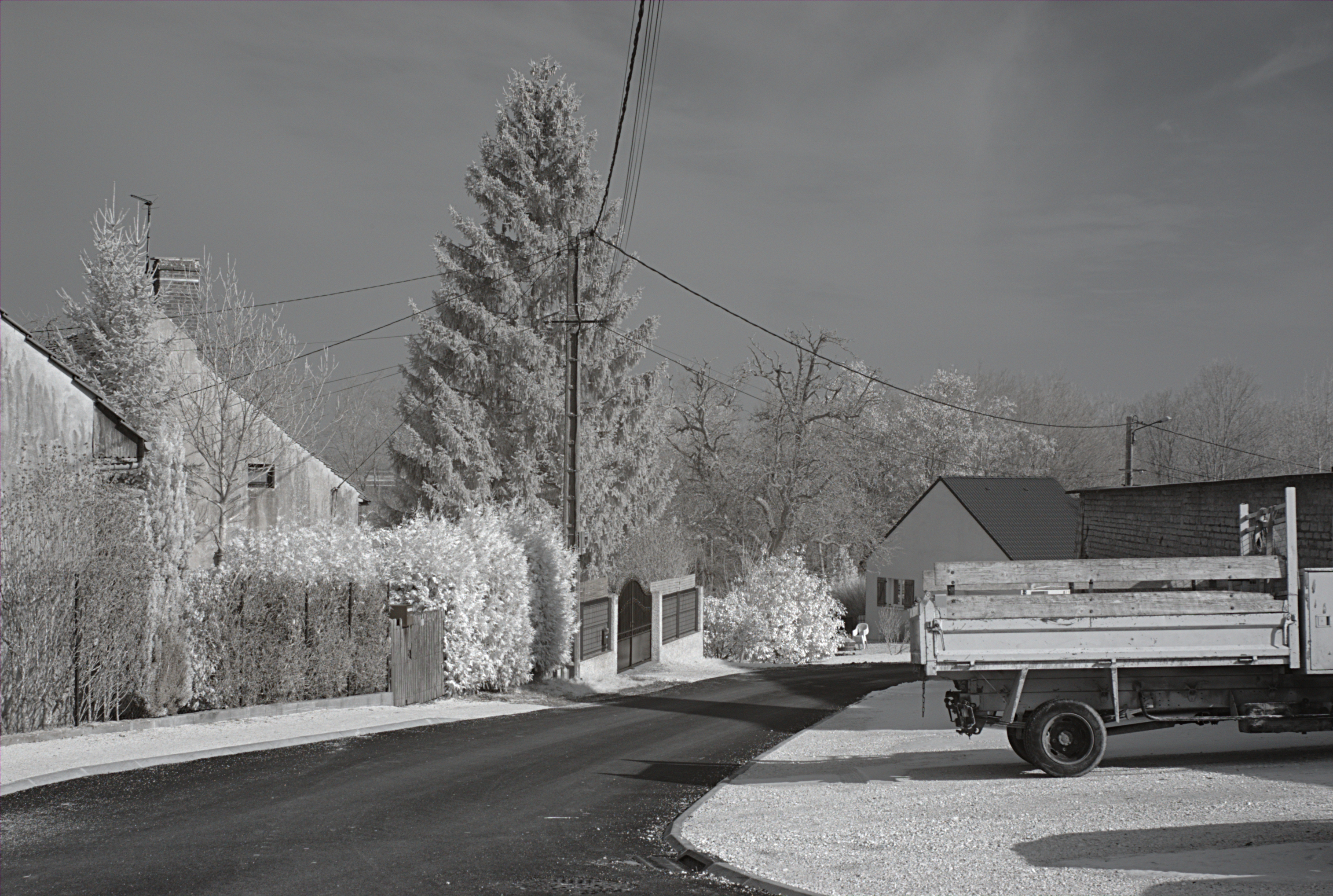 Rue de la Rivière, Aubigny-en-Plaine (Côte d'Or, Bourgogne, France) photographié avec un filtre infrarouge 760 nm.